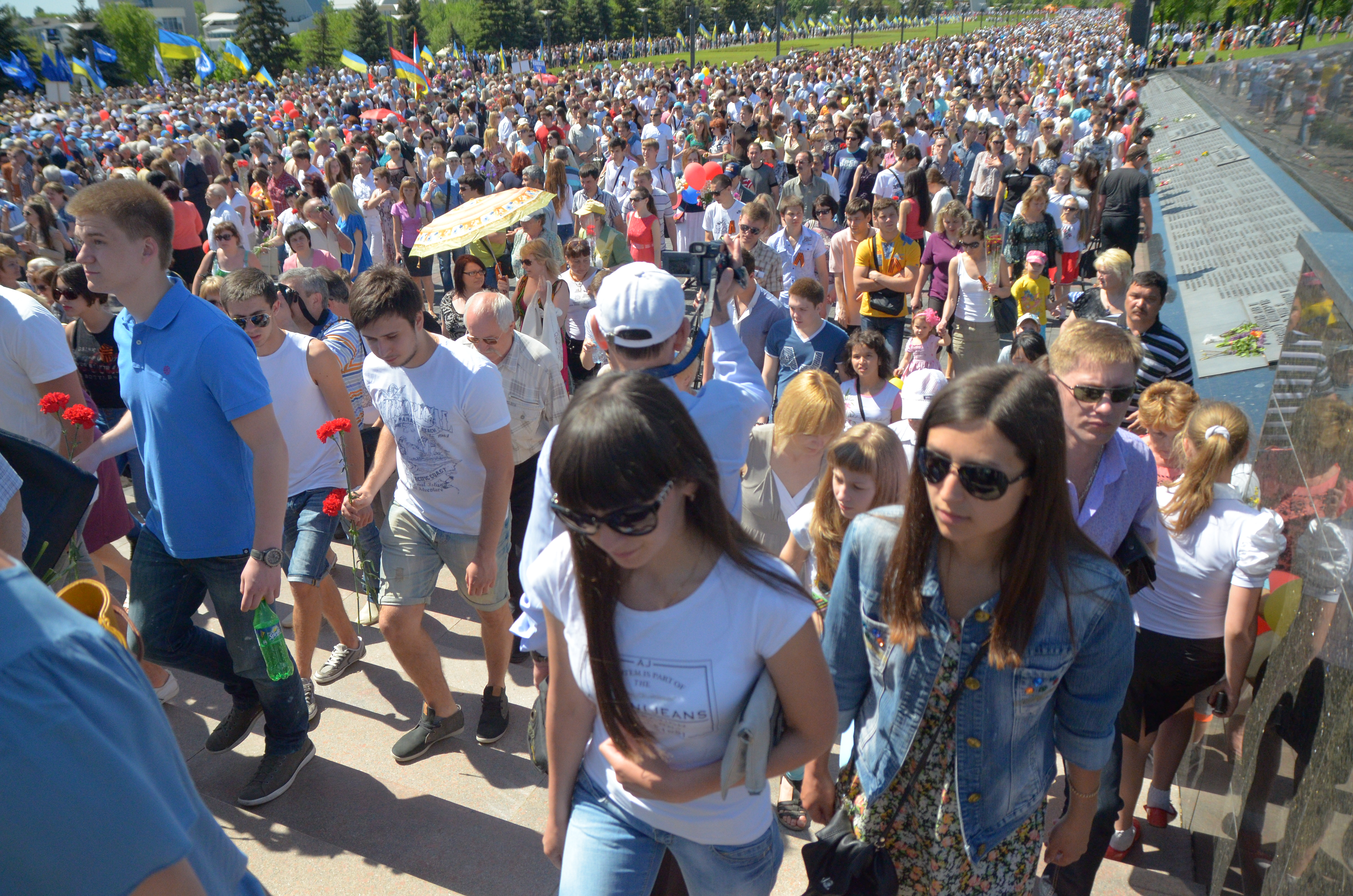 День Победы в Донецке